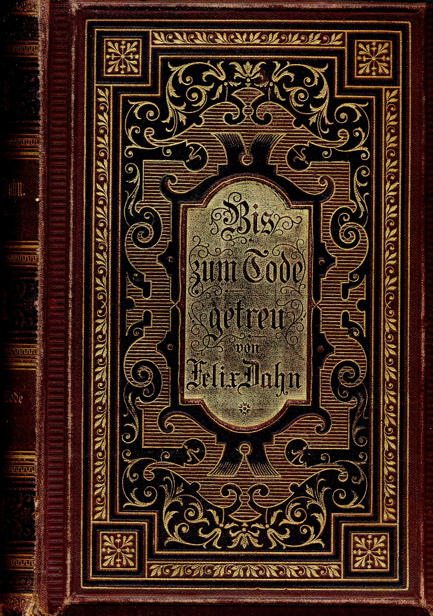 Felix Dahn: Bis zum Tode getreu - Erzählung aus der Zeit Karls des Großen, Leipzig 1889